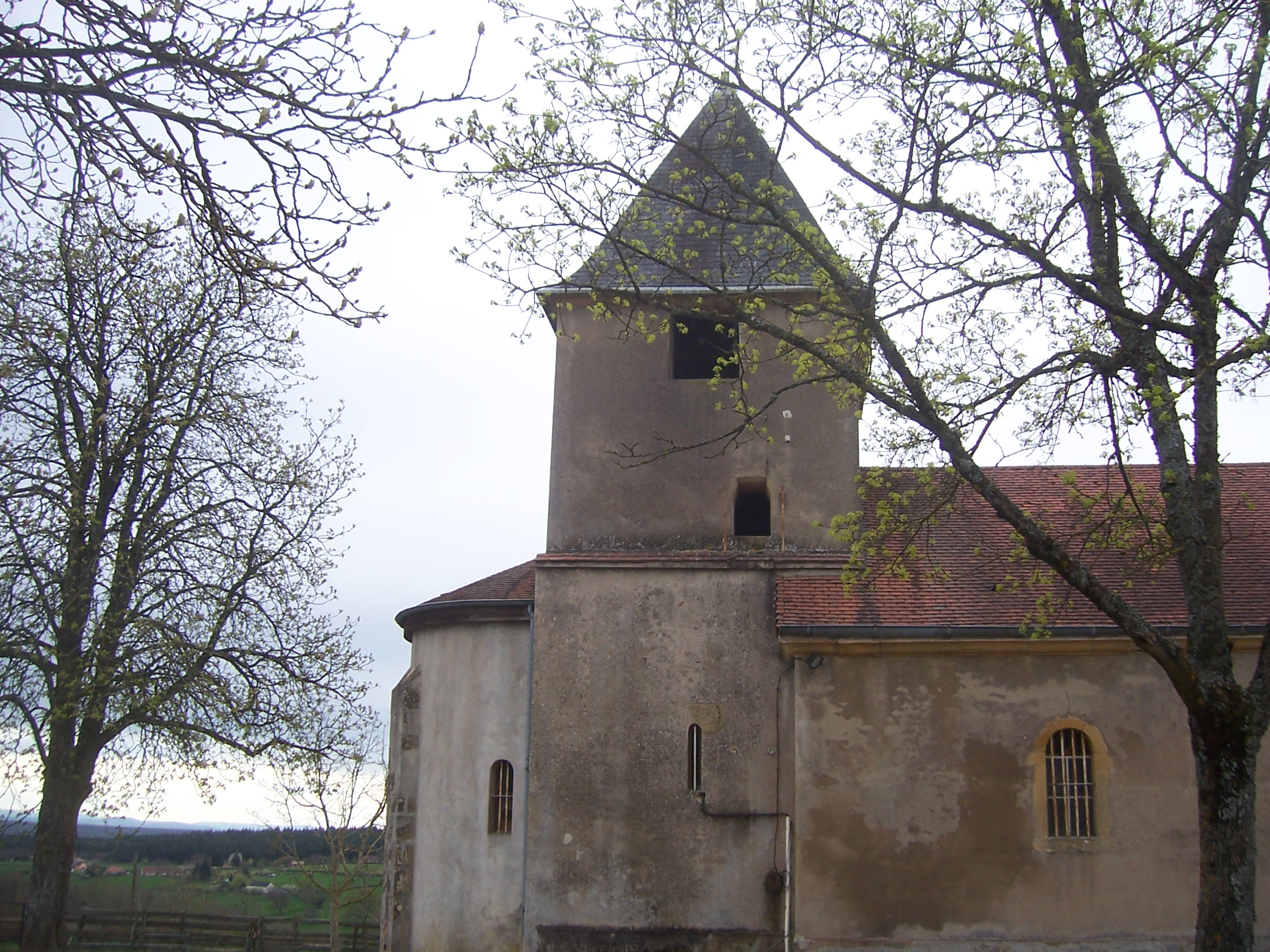 Eglise de Curdin